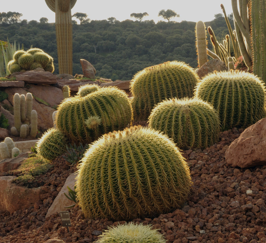 Ejemplares de Echinocactus grusonii en Desert City